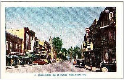 Carte postale, boulevard du Saint-Maurice, Trois-Rivières QC, vers 1940.